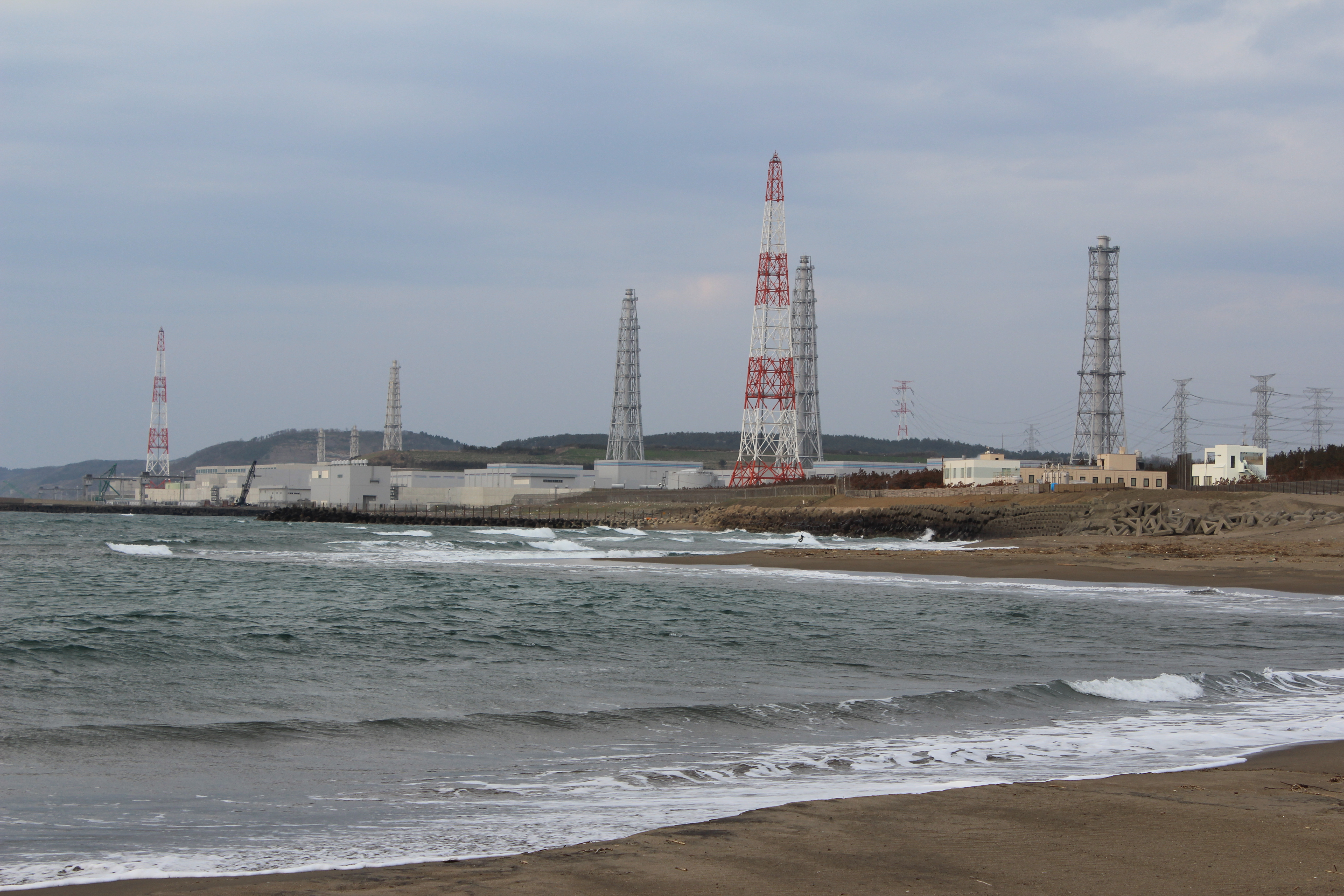 柏崎刈羽原子力発電所。新潟県柏崎市荒浜より北方向を撮影。